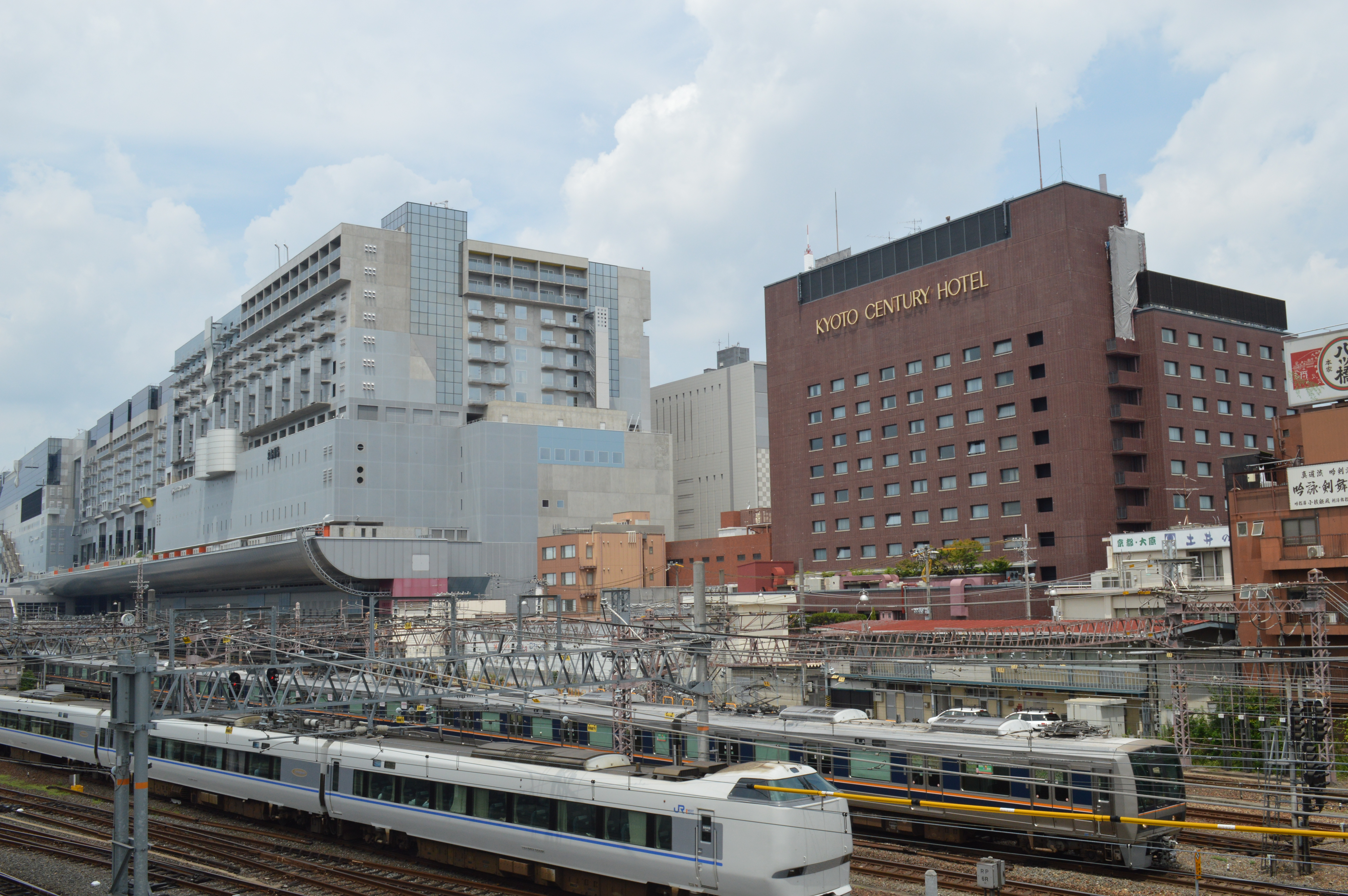 京都市下京区 JR京都駅前にある京都センチュリーホテル